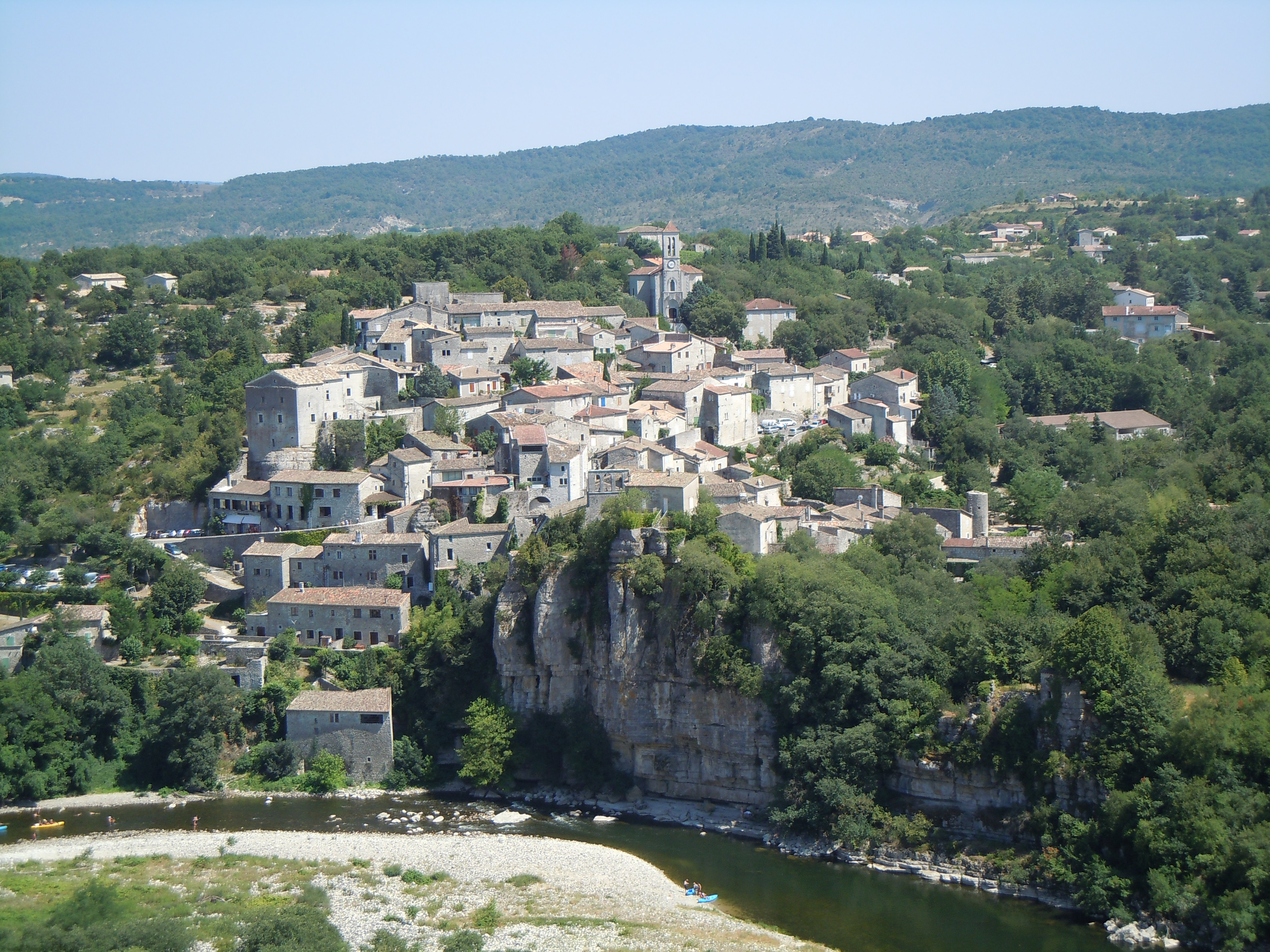 Balazuc- vue d'ensemble